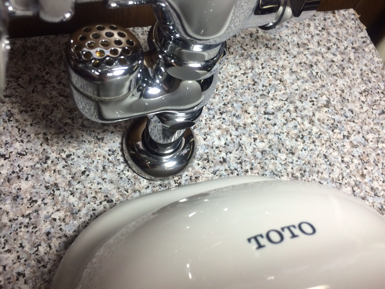 TOTOTV1 -C75